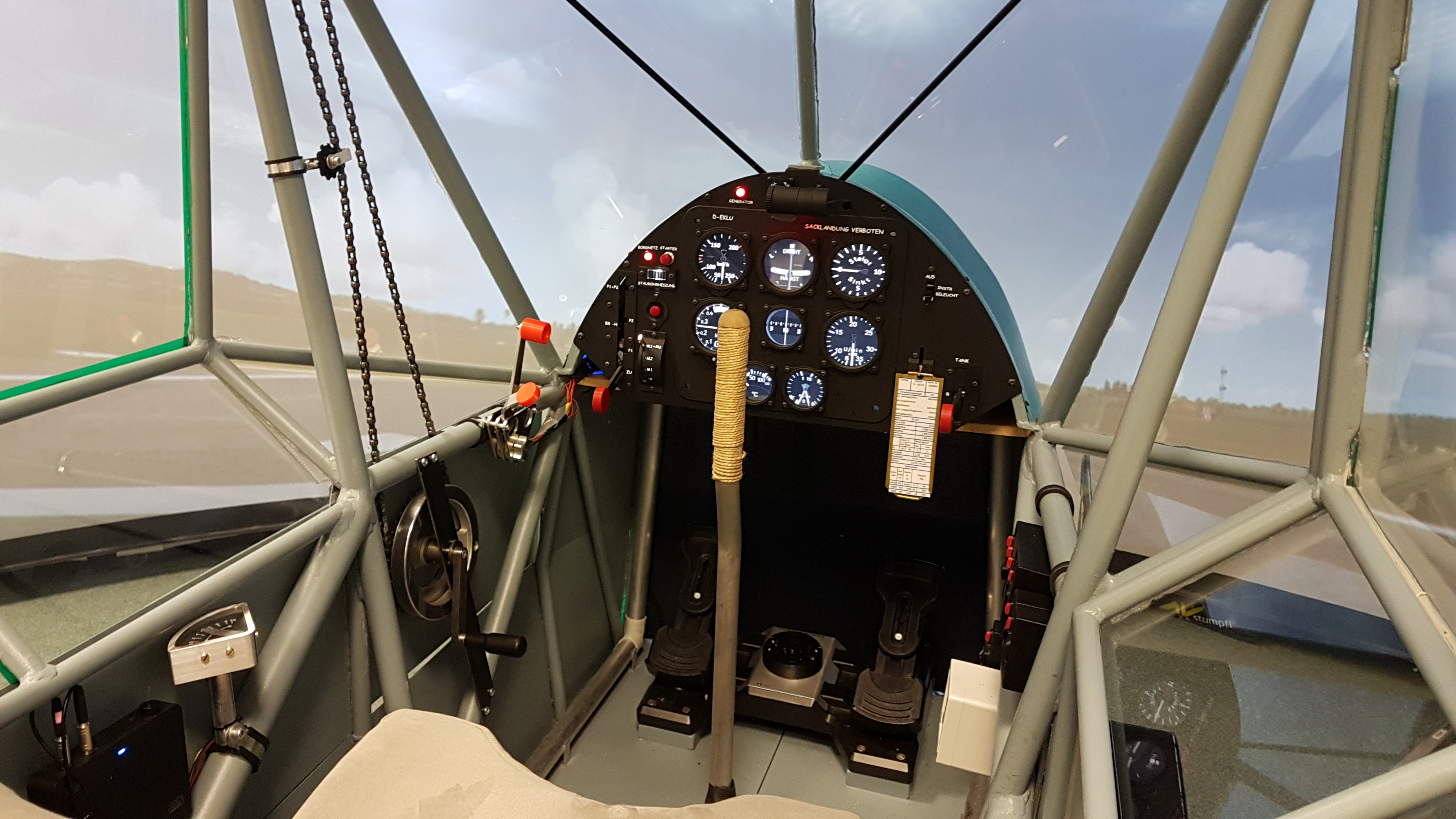 Das Cockpit des Fieseler Storch-Simulators im Kassel Airport Terminal